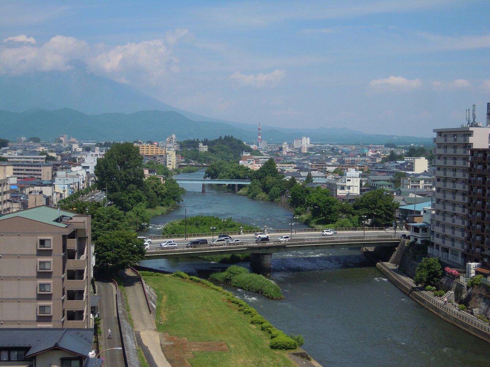 岩手県盛岡市の北上川に架かる夕顔瀬橋を右岸下流側から。